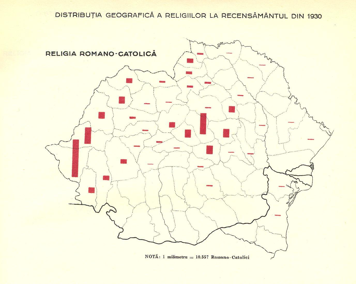 Religia romano-catolică în spațiul românesc conform recensământului populației din 1930